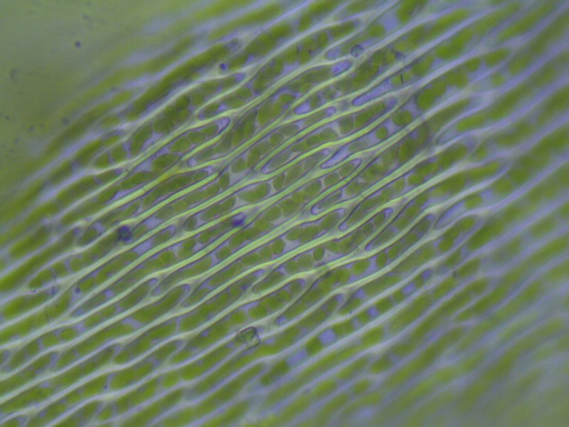 Zypressen-Schlafmoos (Hypnum cupressiforme), Laminazellen, etwa 400x vergr.